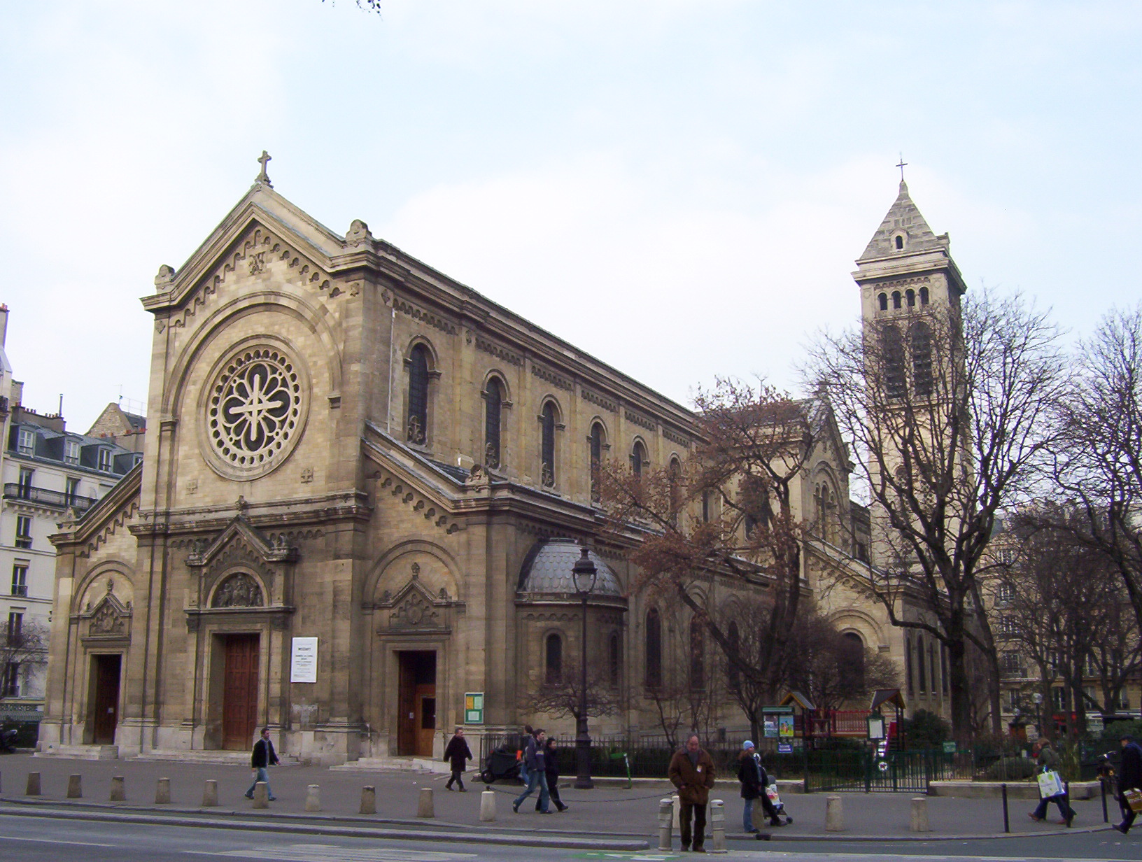 Église Notre-Dame des Champs, à Paris, en France